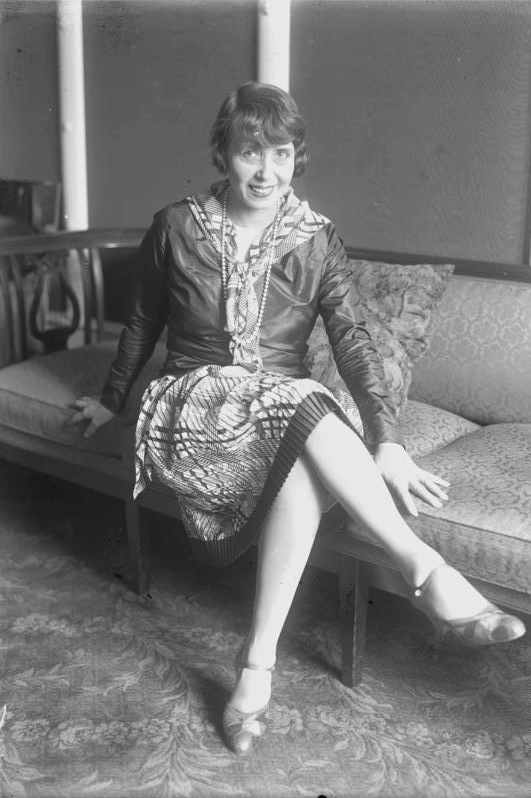 Die weltbekannte französische Revue-Tänzerin Minstinguett in Berlin! Die französische Revuekönigin Minstinguett, welche das für ihren Beruf schon beträchtliche Alter von 64 Jahren hat, wird in einer grossen Berliner Revue auftreten.